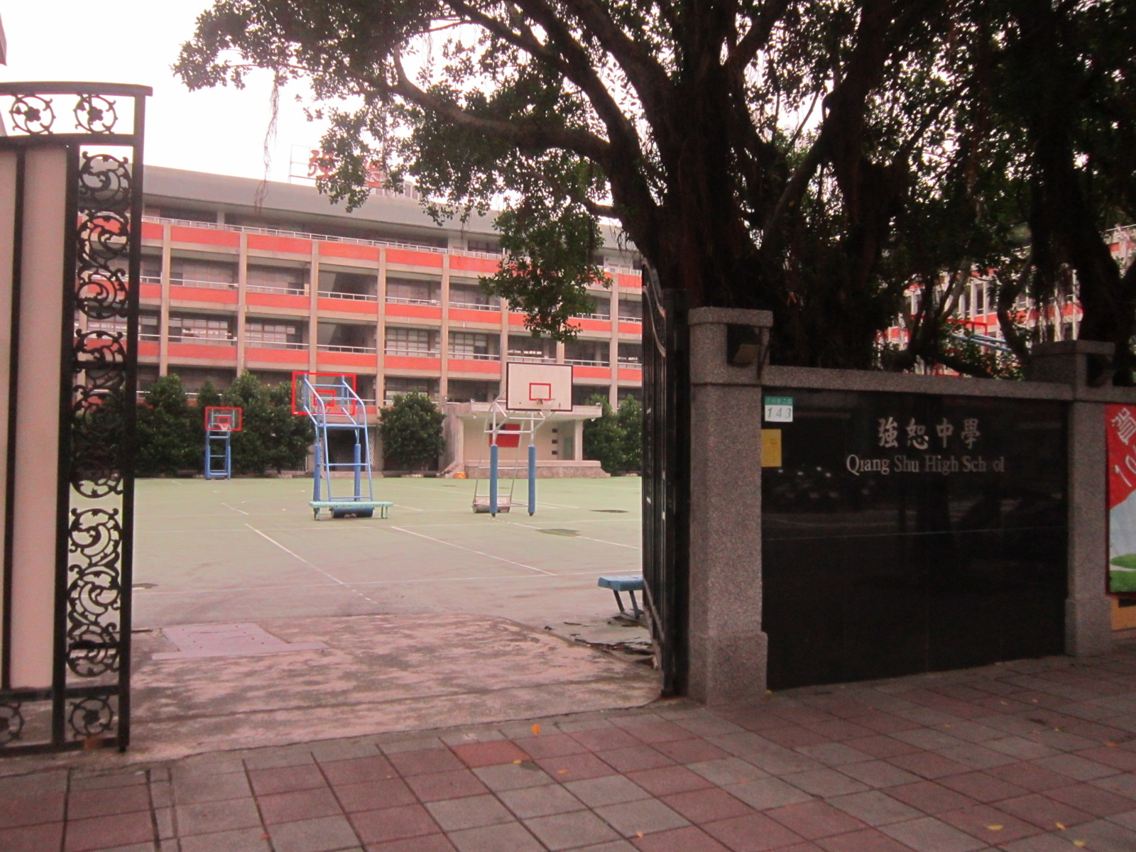 強恕中學校門